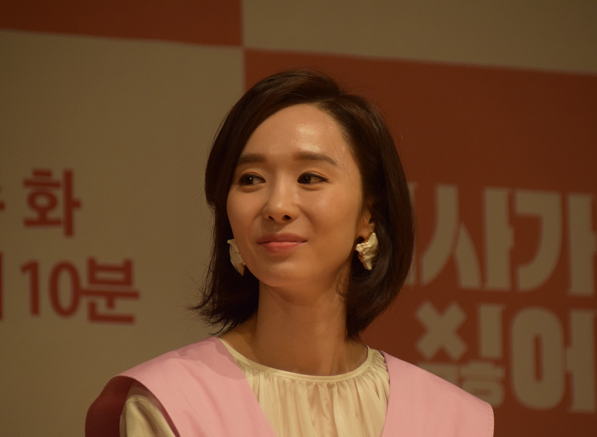 한수연 KBS 2TV 오피스드라마 '회사가기싫어' 제작발표회 (2019.4.8)